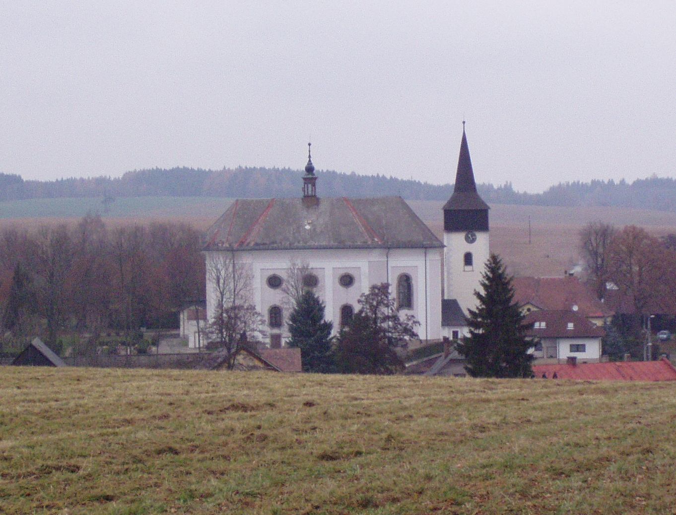 Hajnice - kostel sv. Mikuláše14